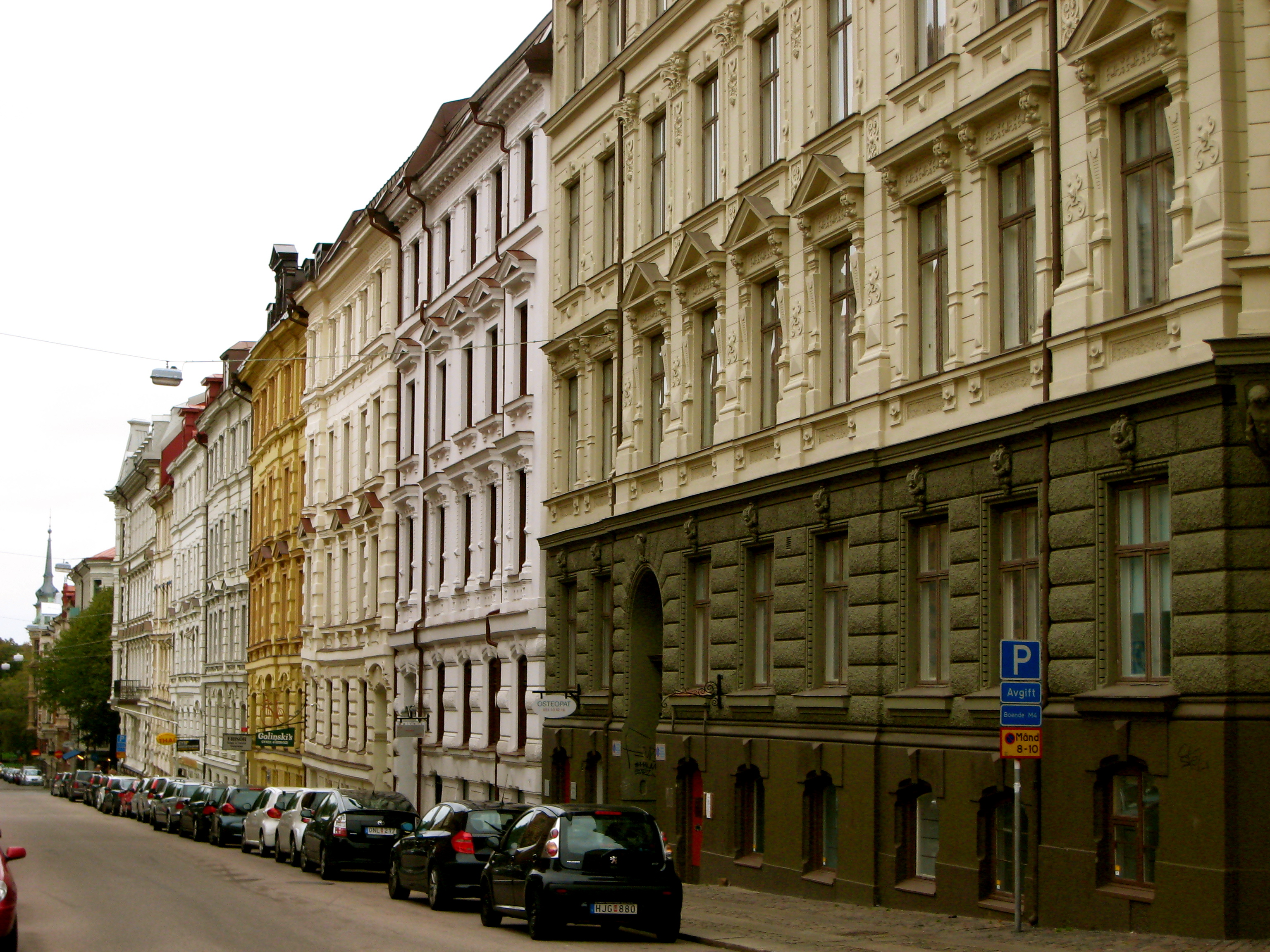 Erik Dahlbergsgatan